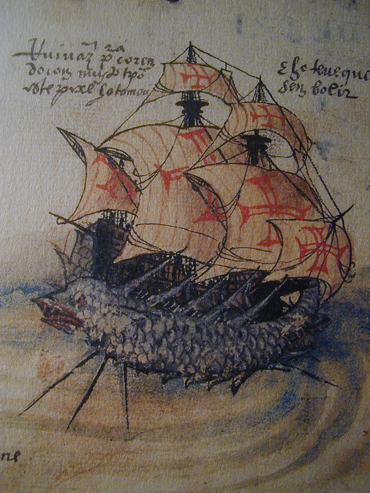 détail du livre de Lisuarte de Abreu, armada de 1520, navire de Rui Vaz Pereira emporté par un monstre marin